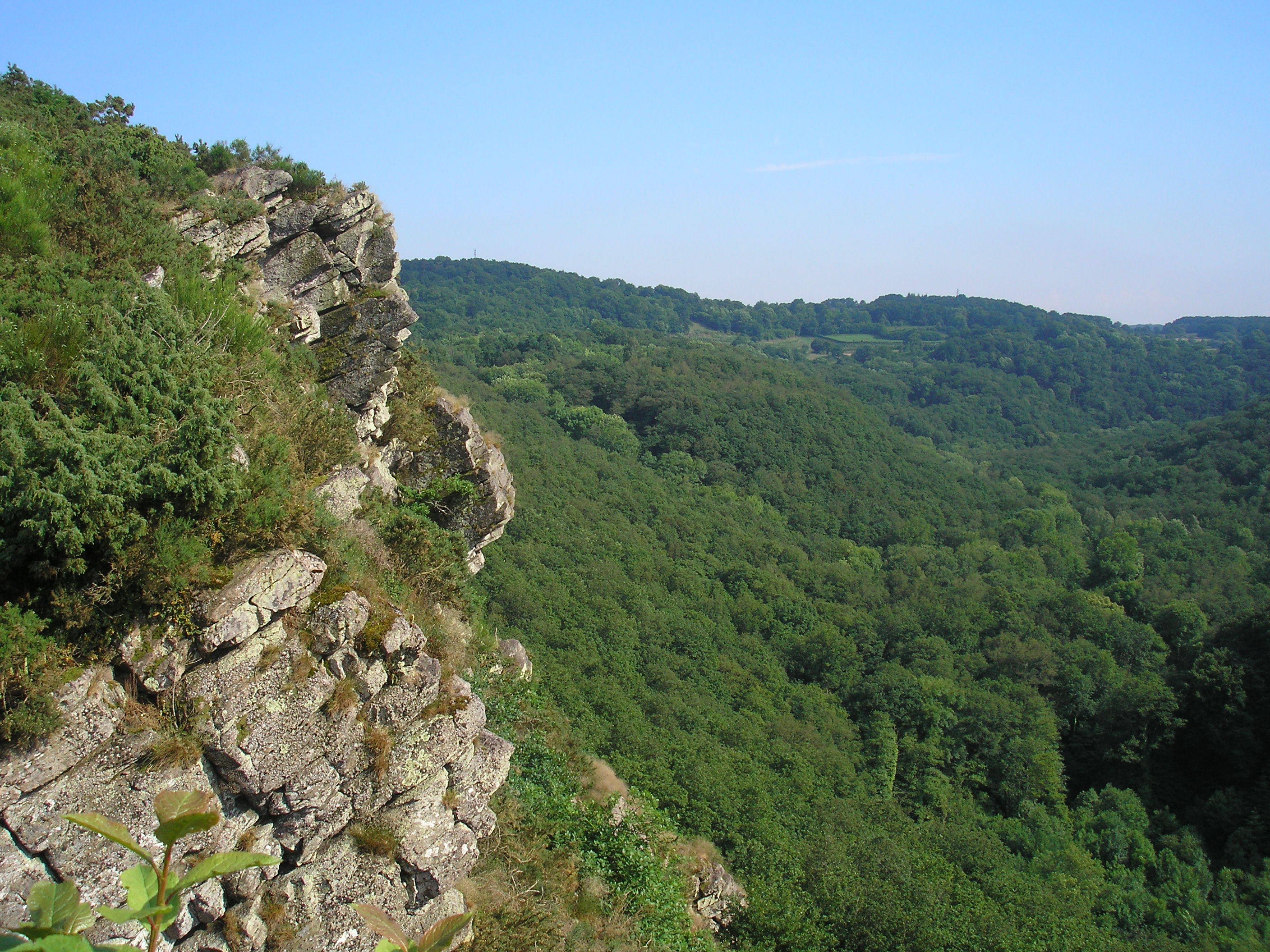 Saint-Philbert-sur-Orne (Normandie, France). Site de la Roche d'Oëtre, dominant la vallée de la Rouvre.